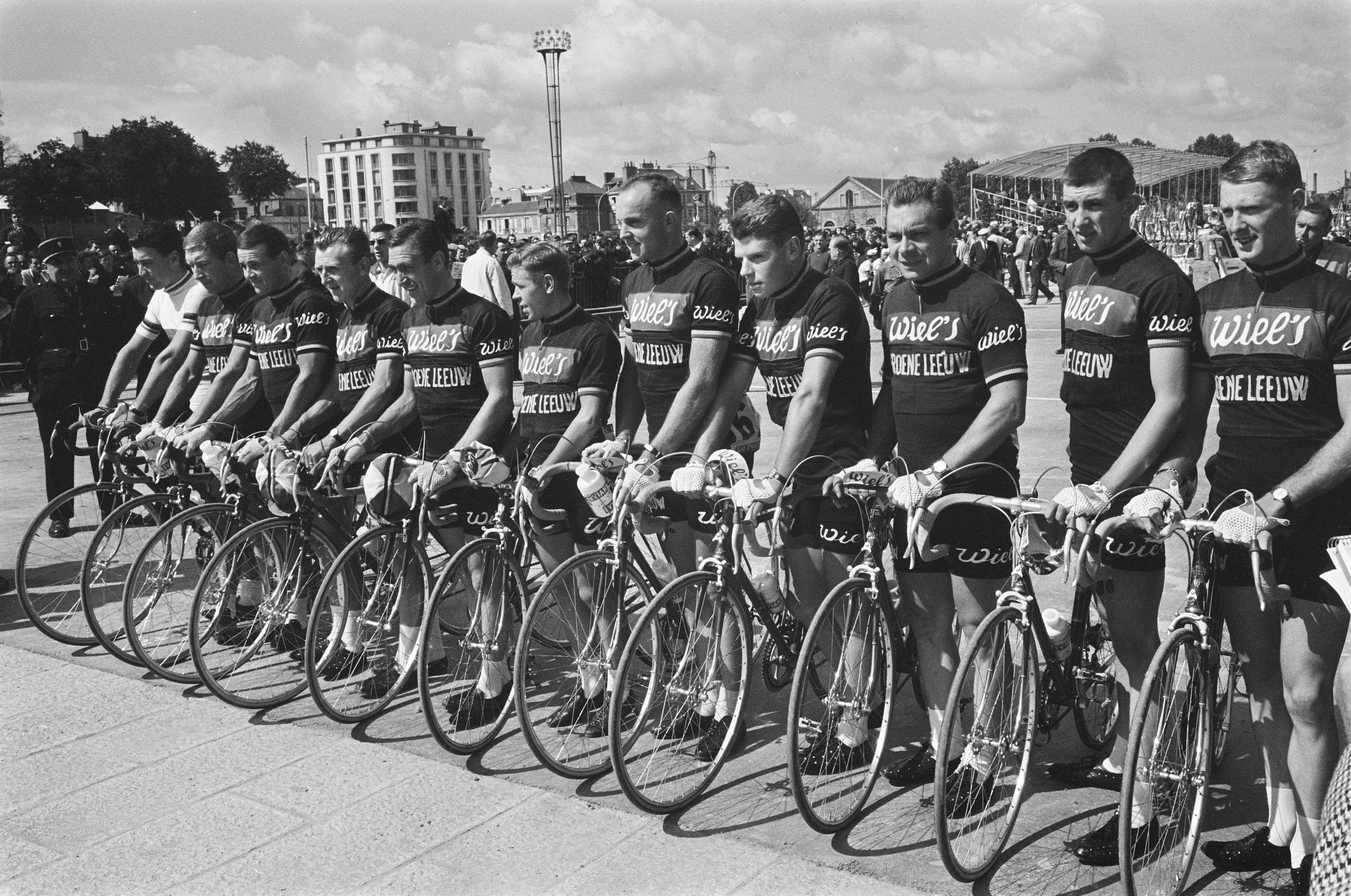 51ste Tour de France 1964, Wiels - Groene Leeuw ploeg.